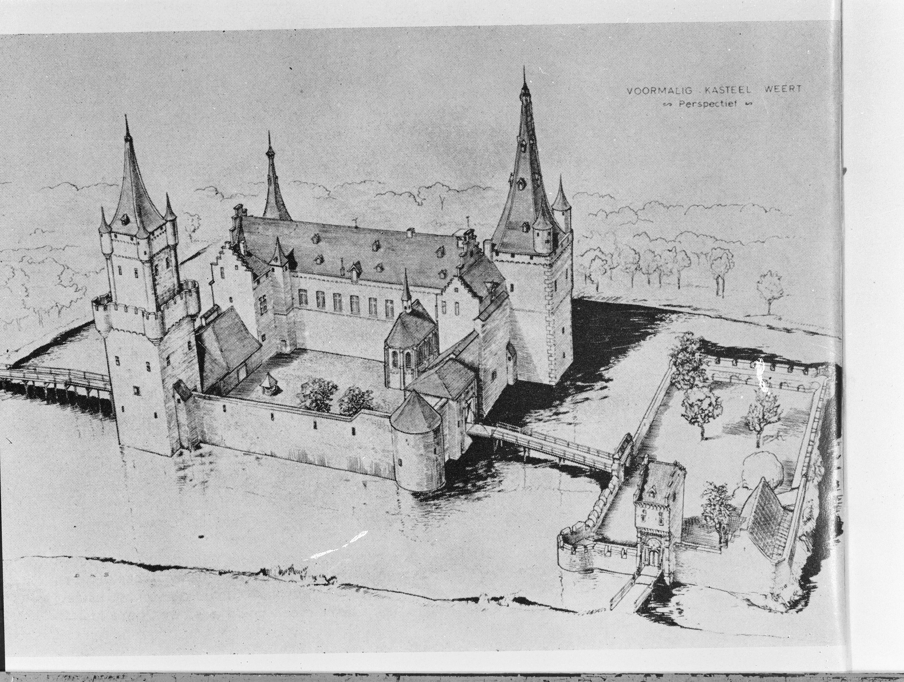 Kasteel: 15e eeuws schilderij, Museum Berlijn